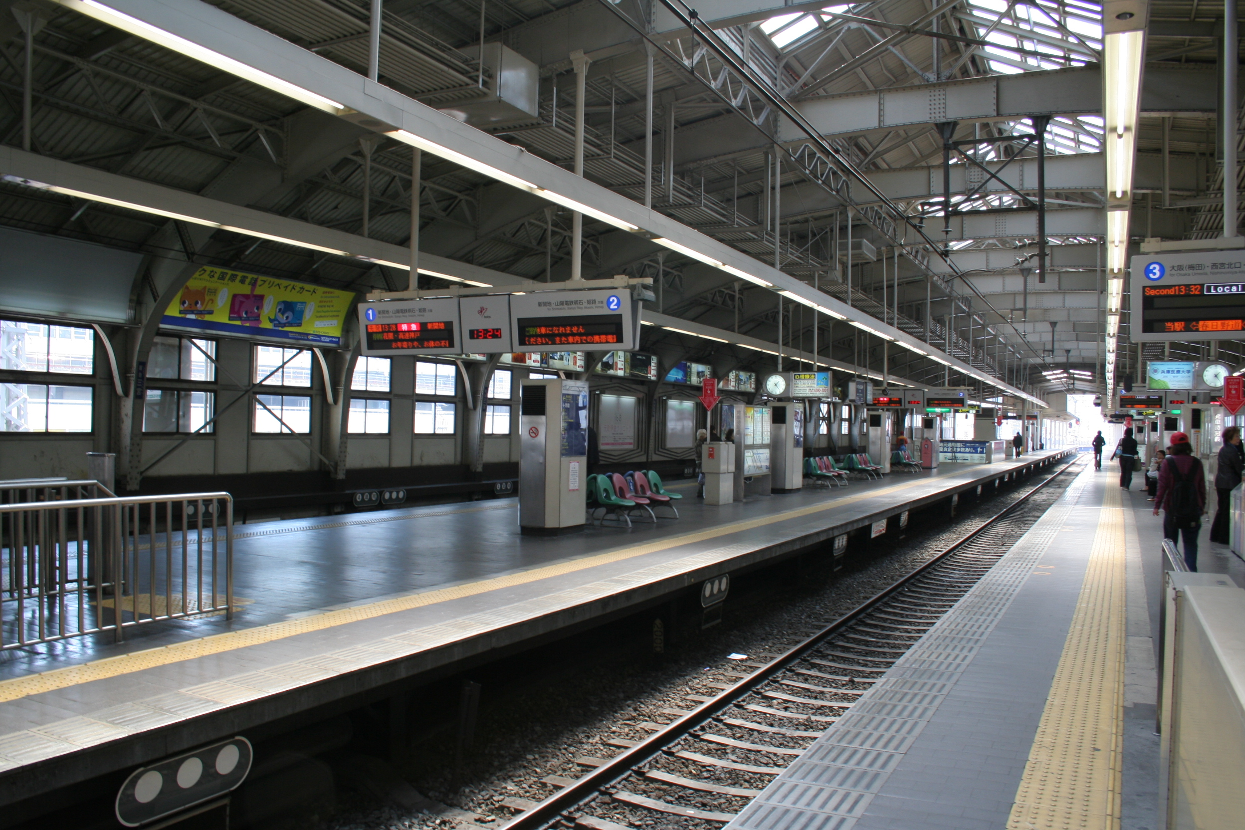 阪急三宮駅。 阪急三宮駅3番線ホームからみた1･2番線ホーム。 東方向へ向かって撮影。